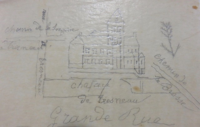 Dessin du château de Tresneau reproduit sur calque en 1915 par M. Ledoux, maire de Châteauneuf en Thymerais à partir d'un dessin ancien appartenant à son adjoint.